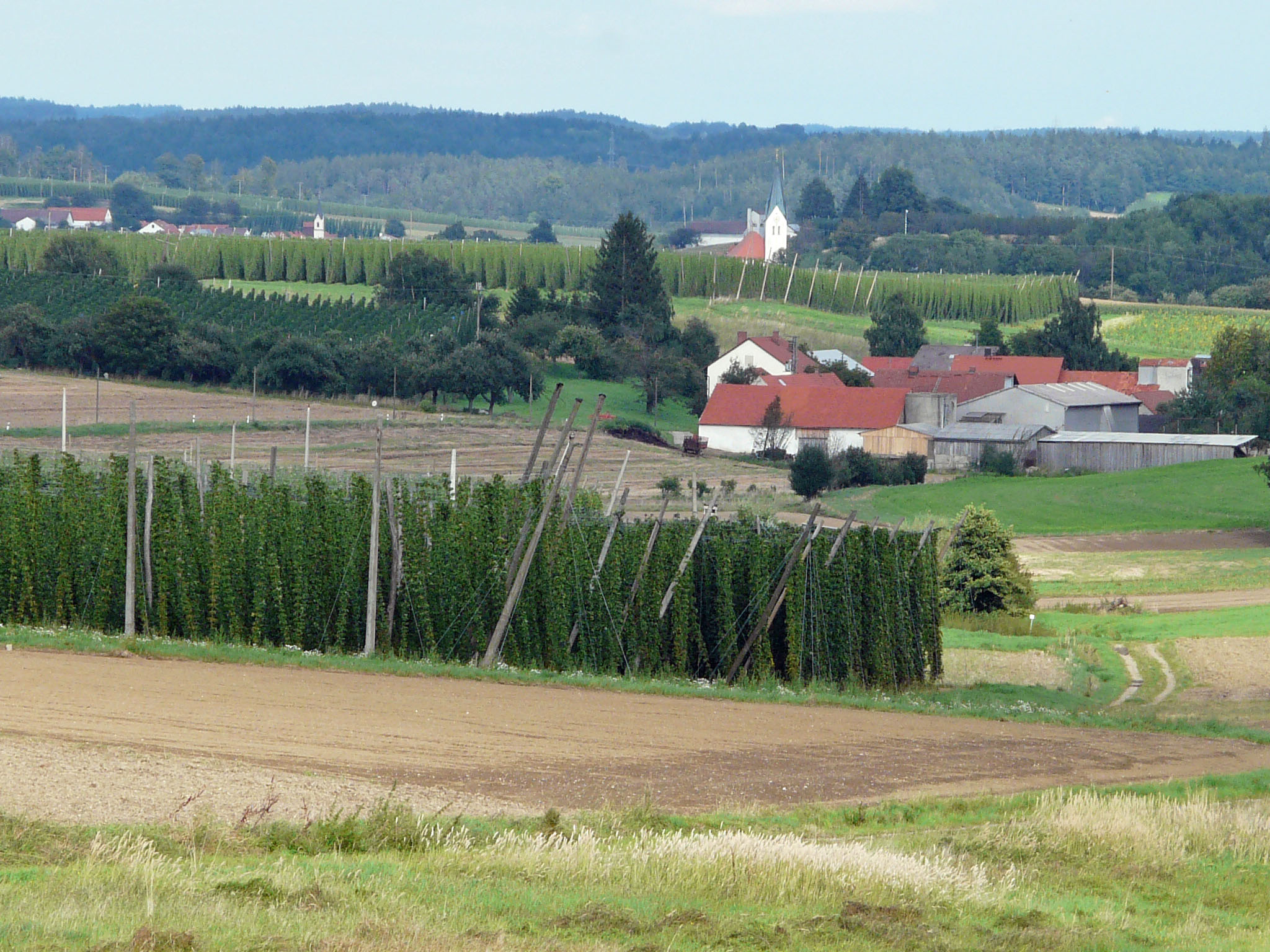 Hallertau bei Sünzhausen, Schweitenkirchen